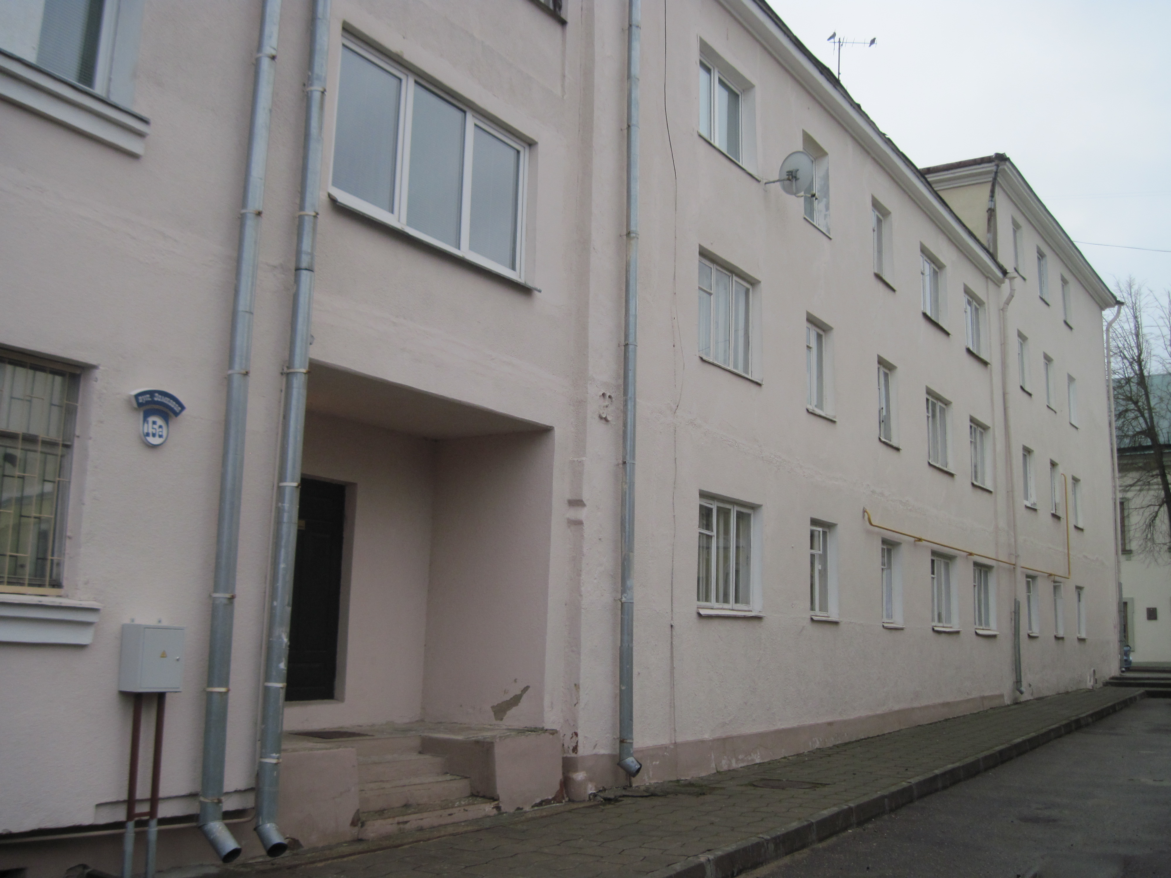 Беларуская (тарашкевіца): Будынак Гродна, Савецкая, 15А